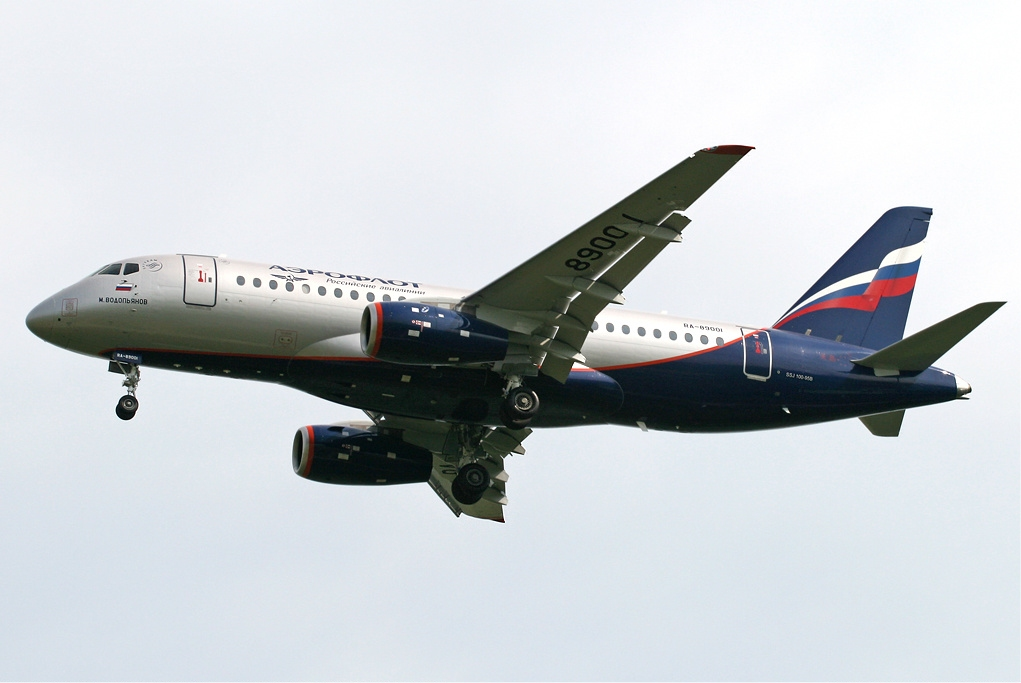 Aeroflot Sukhoi SuperJet 100